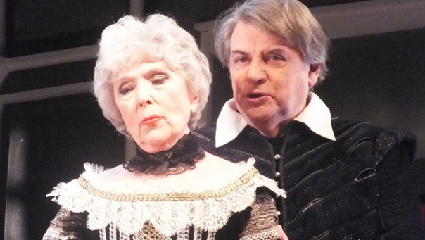 7\1\12,гастроли театра Сатиры в Санкт-Петербурге